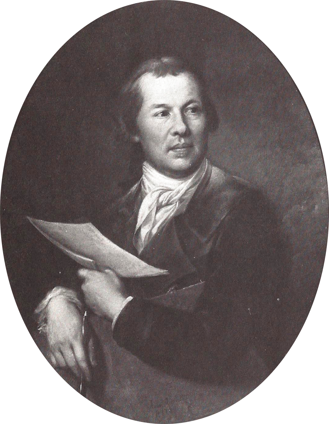 Bildnis Sigmund Freudenberger (1745-1802).